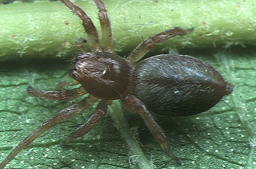 female Clubiona jucunda from Okinawa.